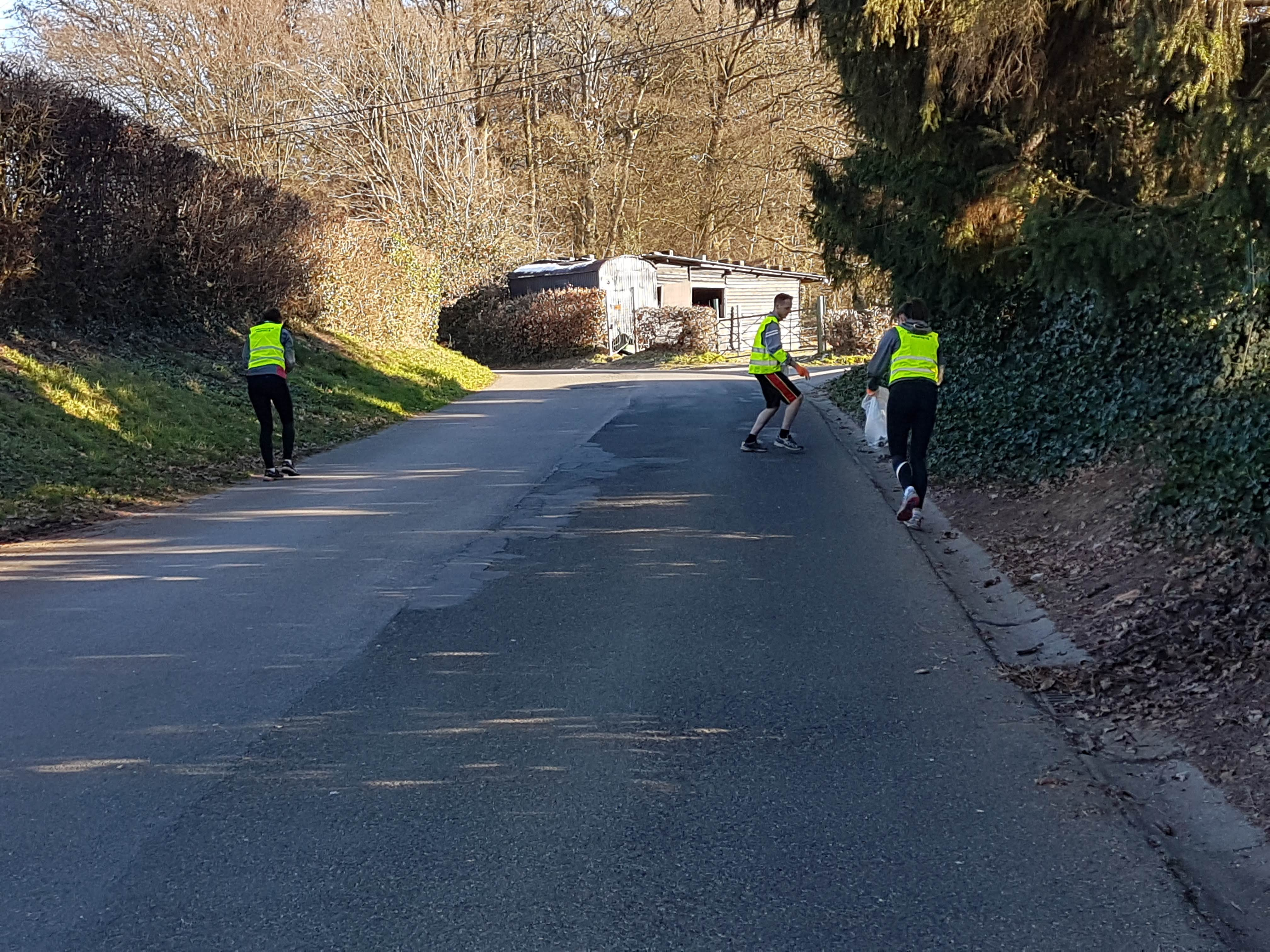 Une des équipes de "ploggeurs" de Verviers du groupe "Se remuer pour Verviers (et ses alentours)" nettoyant Stembert en collaboration avec "Detritus Stop" le dimanche 20 janvier 2019.